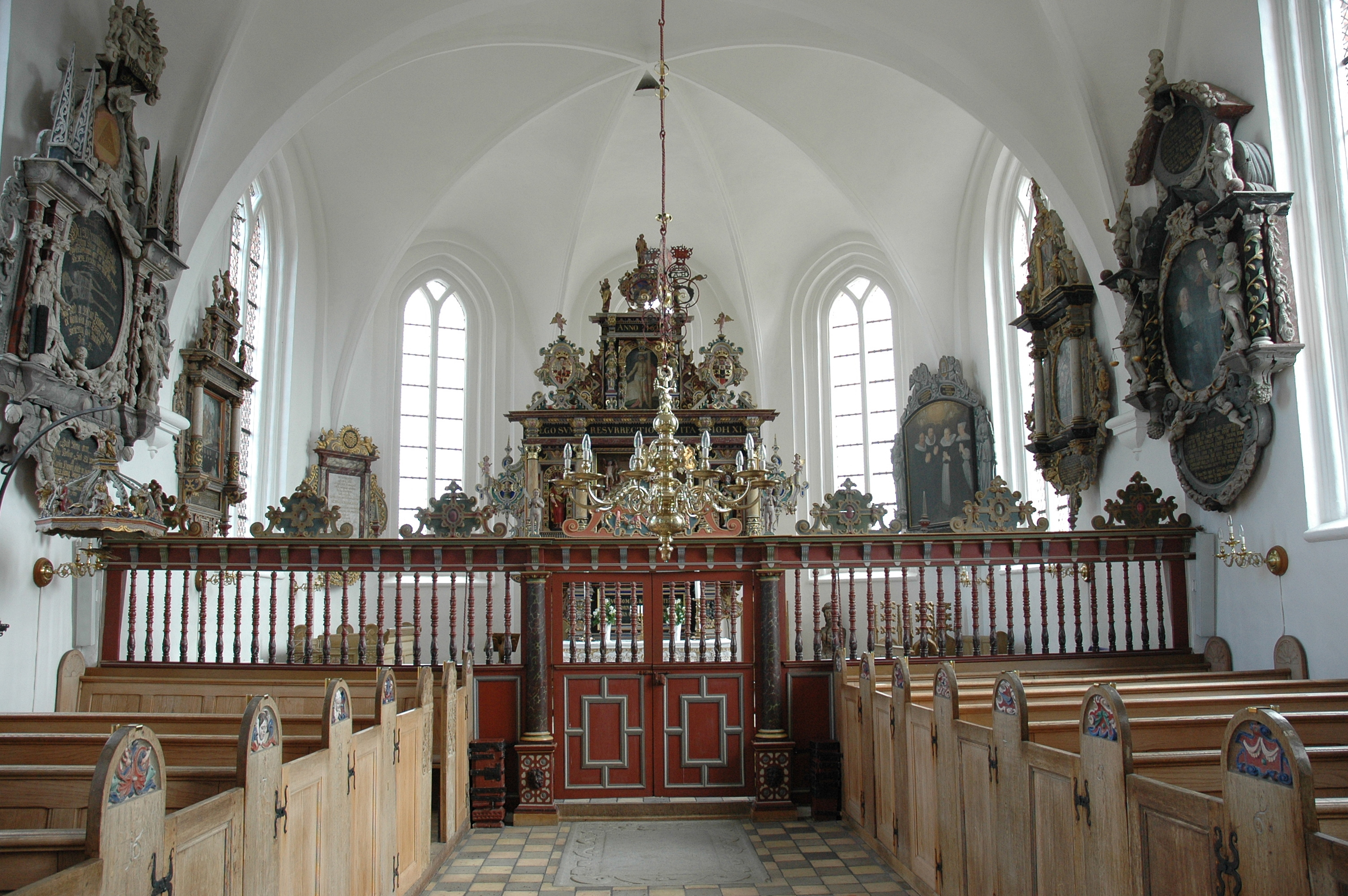 Slangerup Kirke Slangerup Kirke